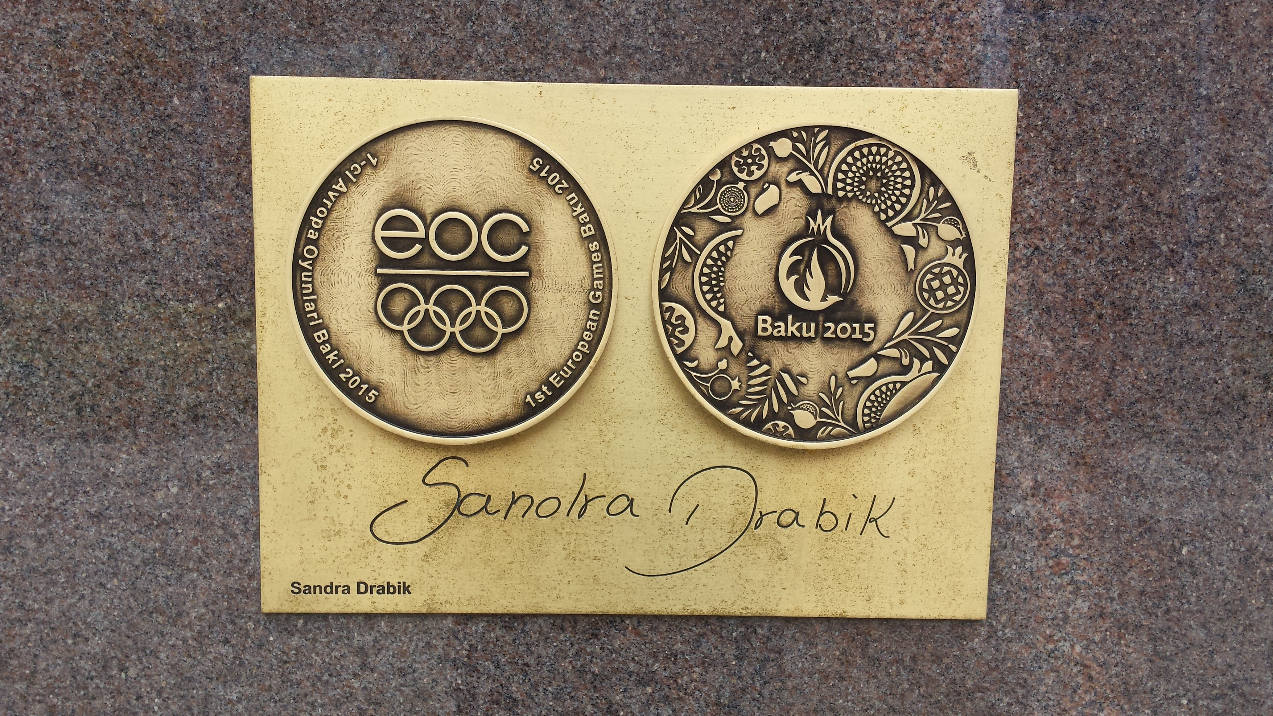 Medal Sandry Drabik z Igrzysk Europejskich 2015 na Alei Gwiazd Sportu w Dziwnowie